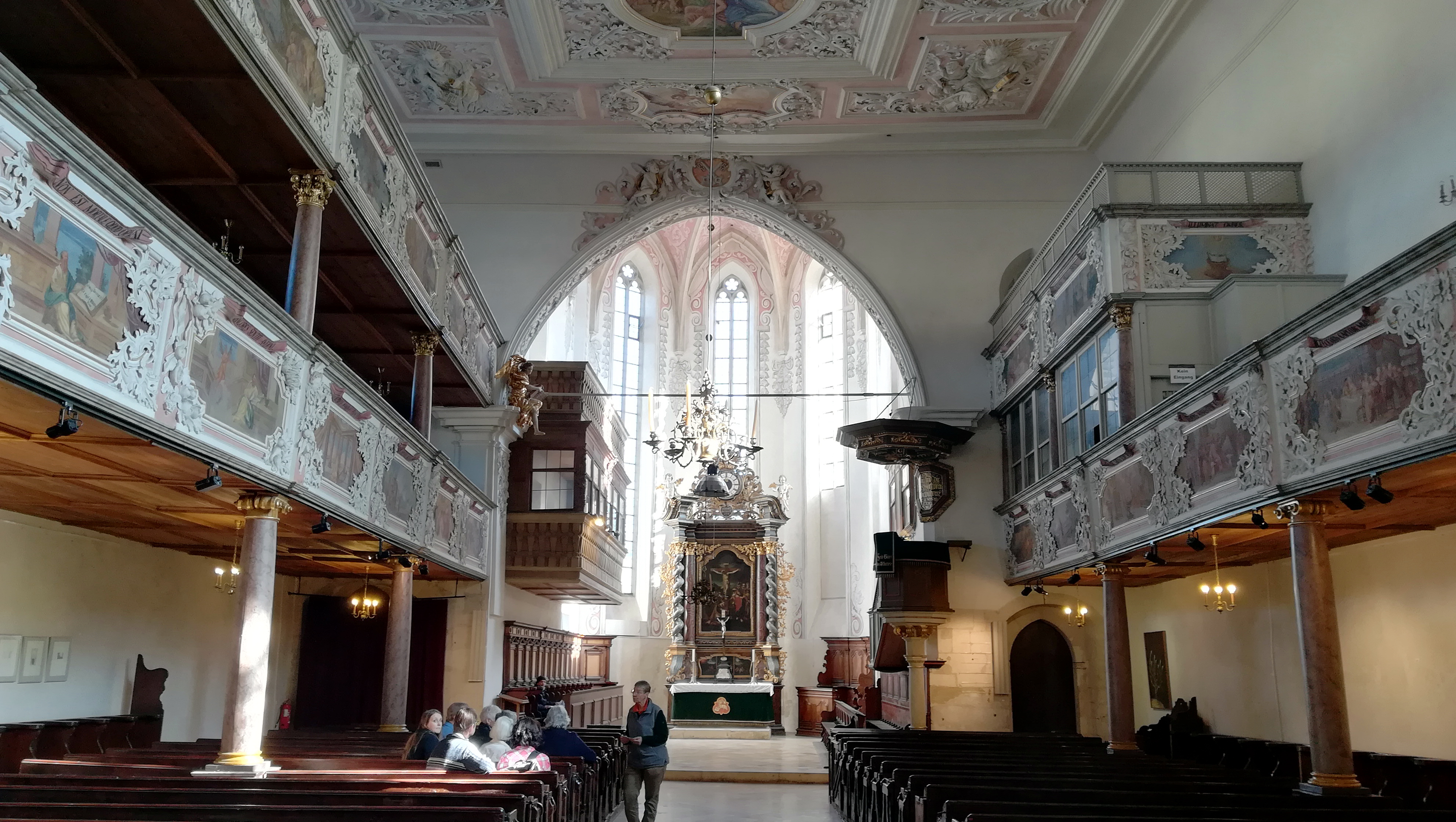 Die Kirche St. Oswald ist eine evangelisch-lutherische Kirche in Regensburg.